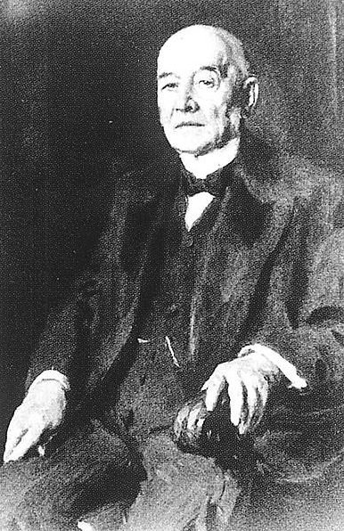 Sigmund Aschrott (1826-1915)